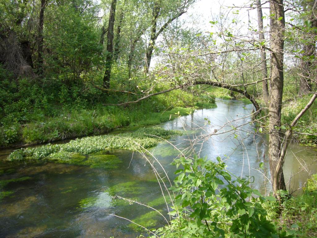 Река Избалык у Шиковки Павловского района